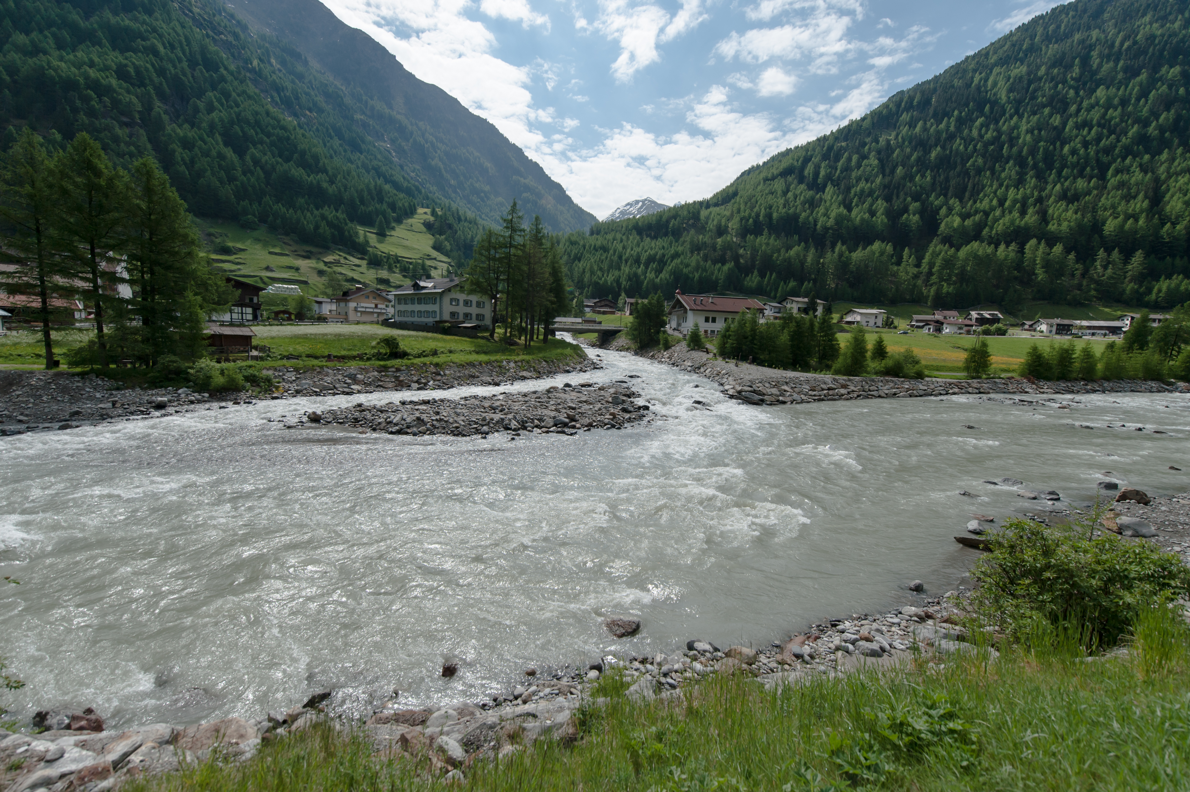 Wiki takes Nordtiroler Oberland: Sölden - Zwieselstein, Ötztaler Ache, Gurgler Ache